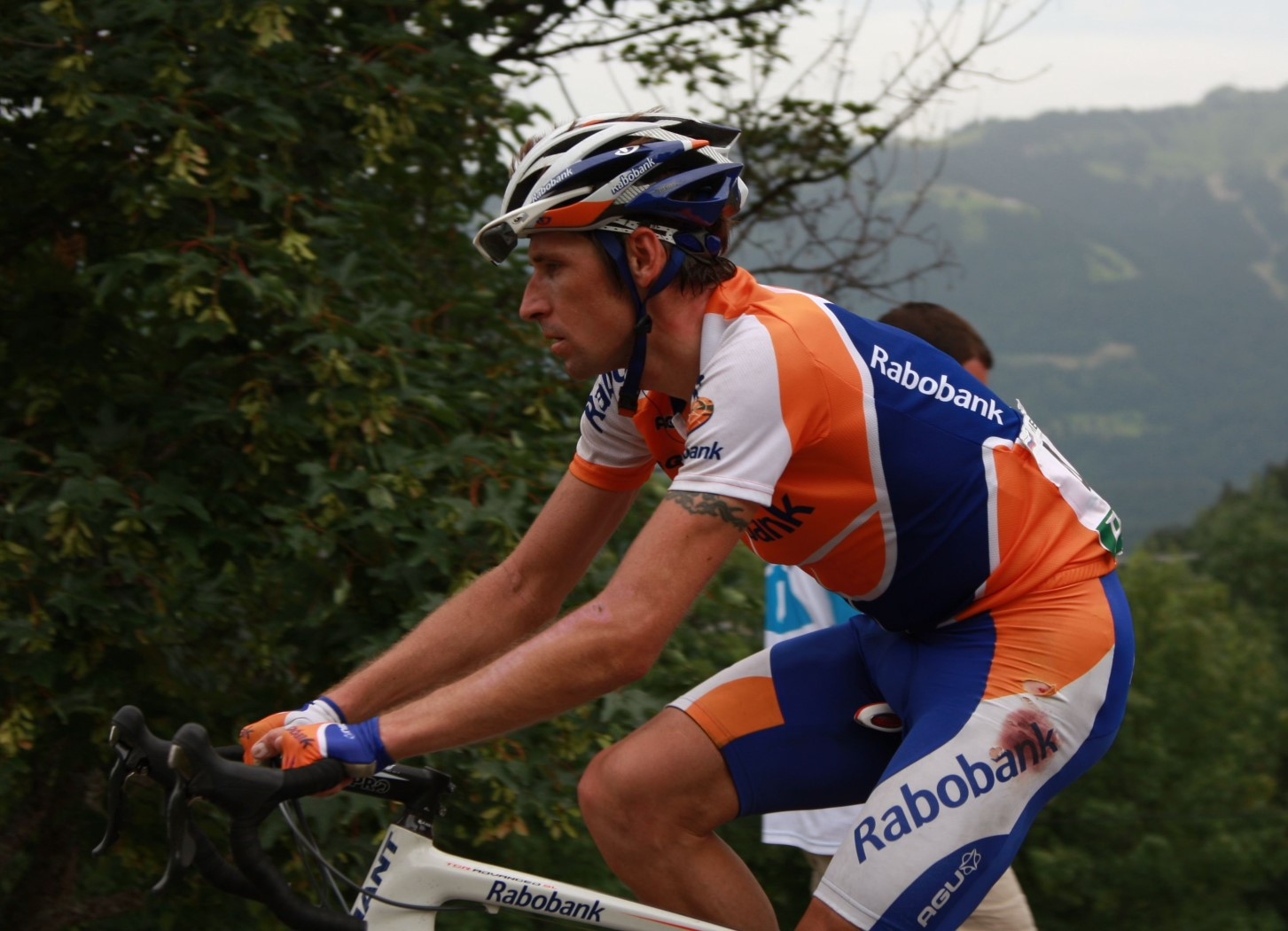 8862 menchov